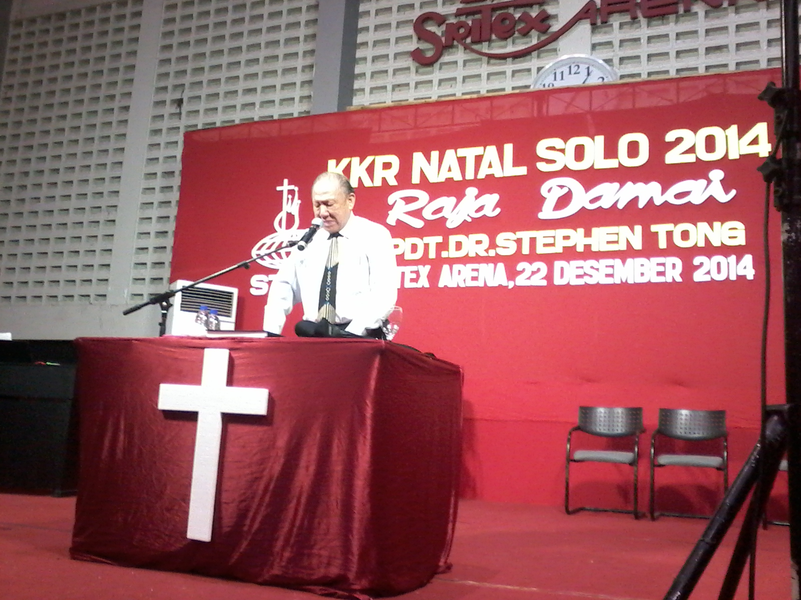 KKR Natal Solo - Raja Damai